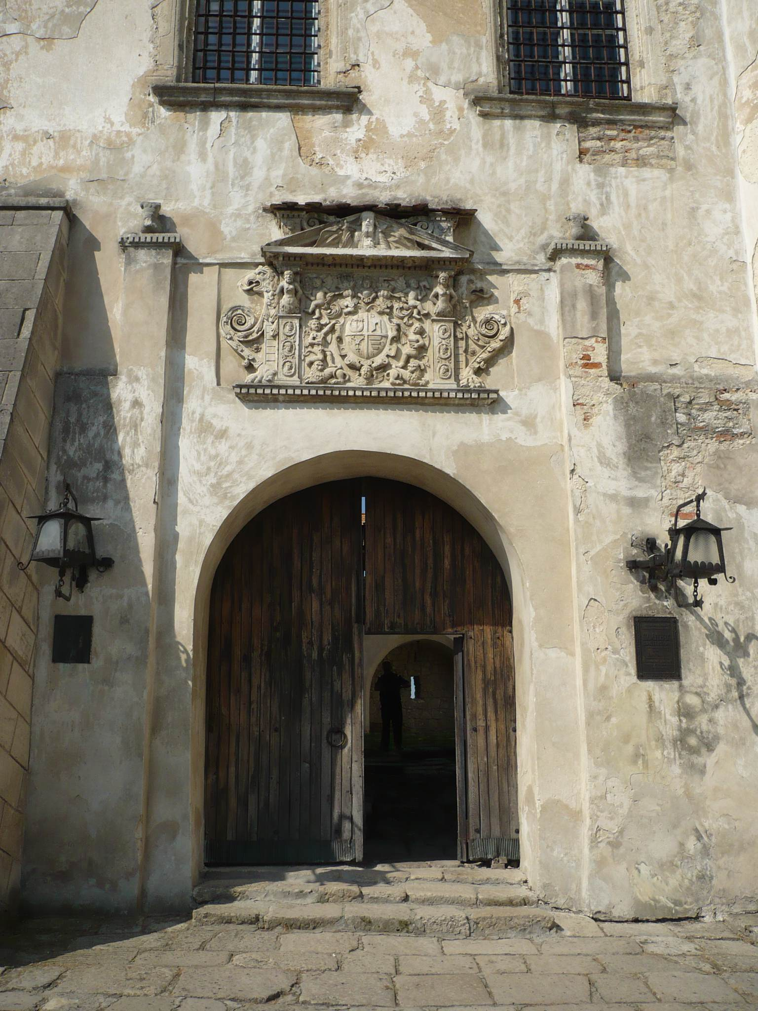 Olesko, brama do zamku